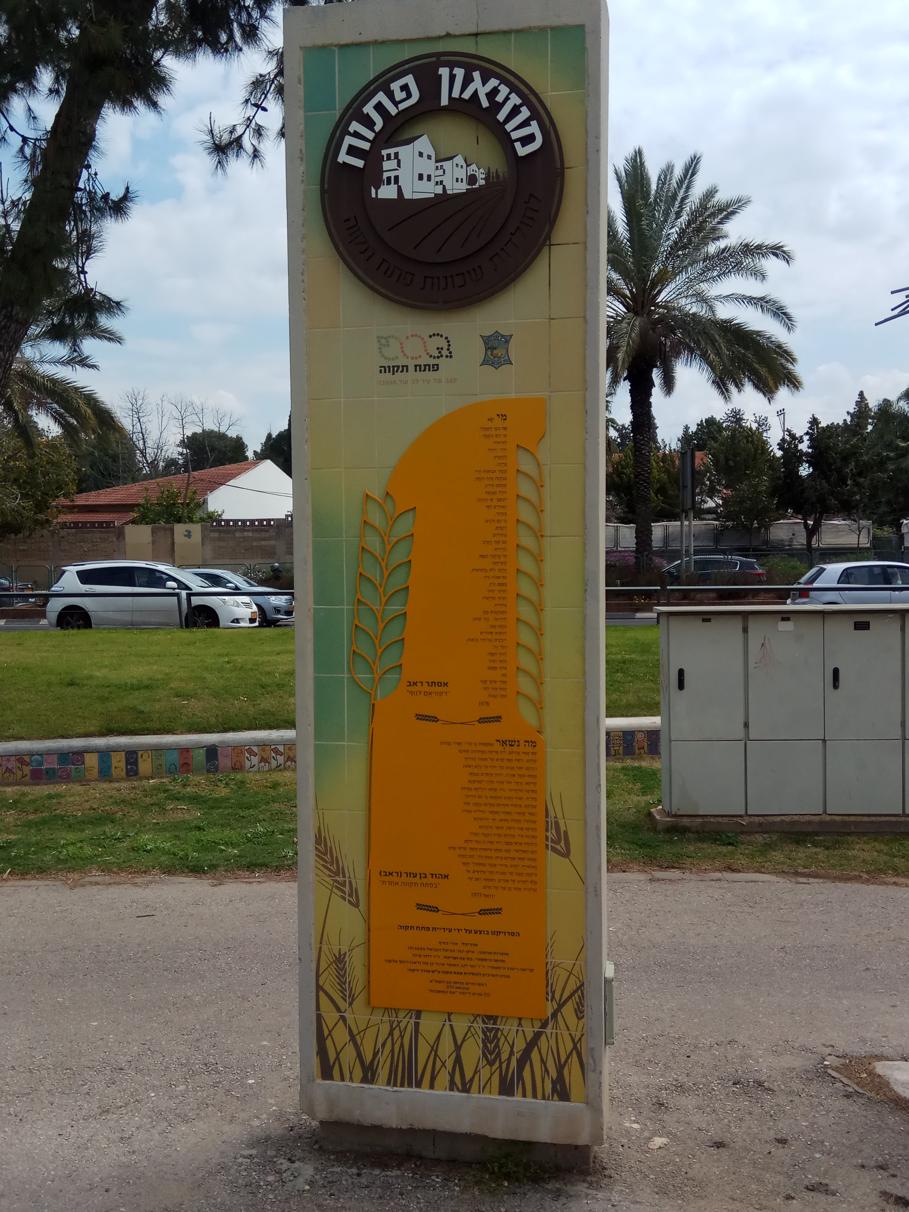 המוזיאון הפתוח בפתח תקווה, בקצה רחוב פוחס בעין גנים